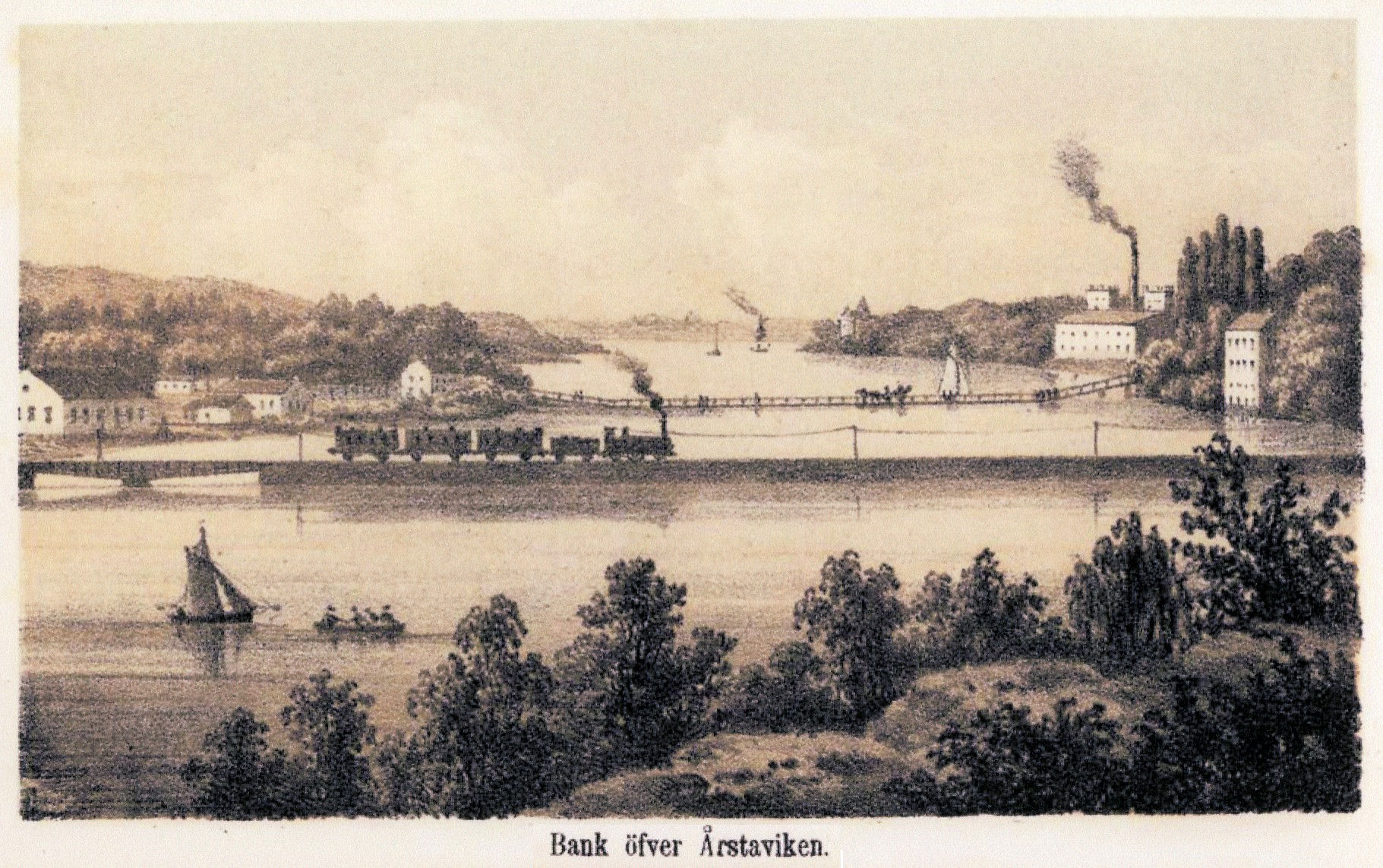 "16 Utsigter i färgtryck af sammanbindnings-banan genom Stockholm och dess utsträckning till Liljeholmen: med plan och profilkarta samt text. "